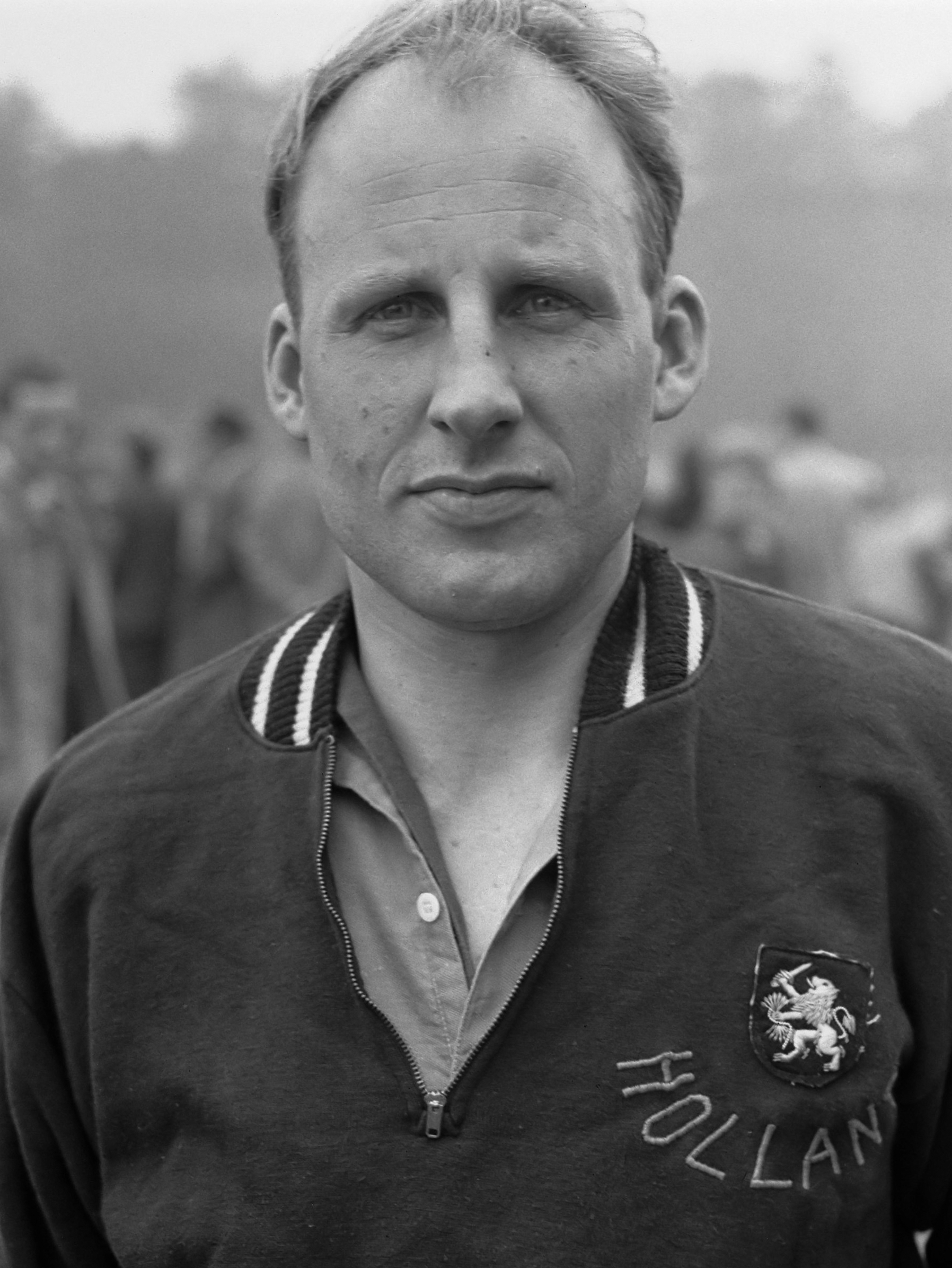 Koppen Nederlands hockey-elftal . J. F. Drijver 14 oktober 1956